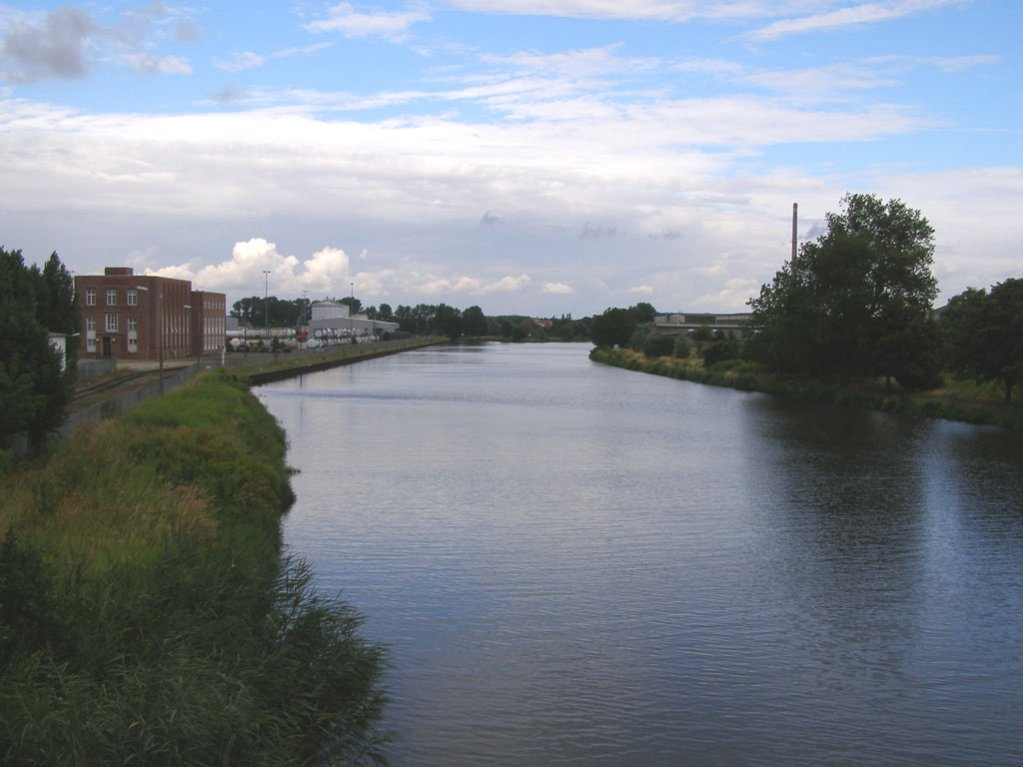 Elb-Havel-Kanal in Genthin, Richtung Osten